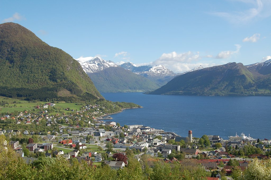 Volda sentrum, mai 2006.